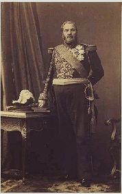 Bernard-Pierre Magnan (1781-1865), maréchal de France